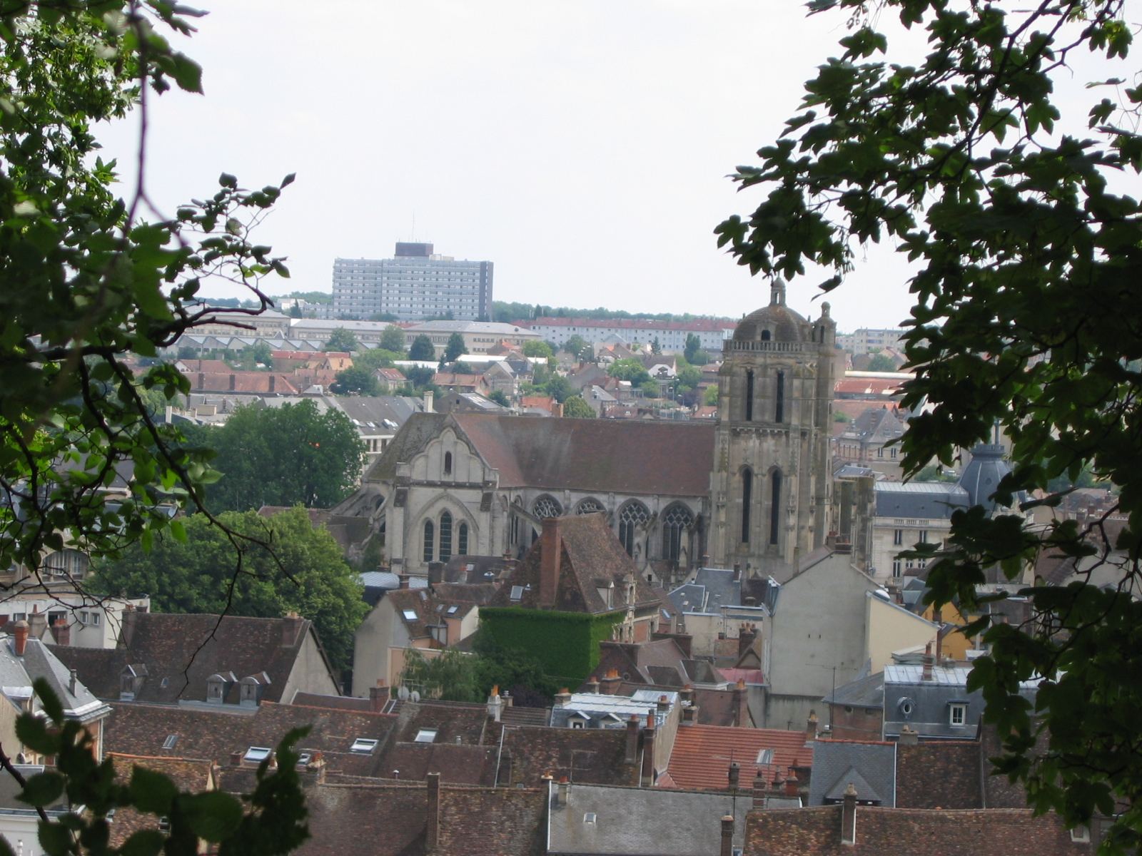 Église Saint-Pierre de Dreux, Eure-et-Loir (France).